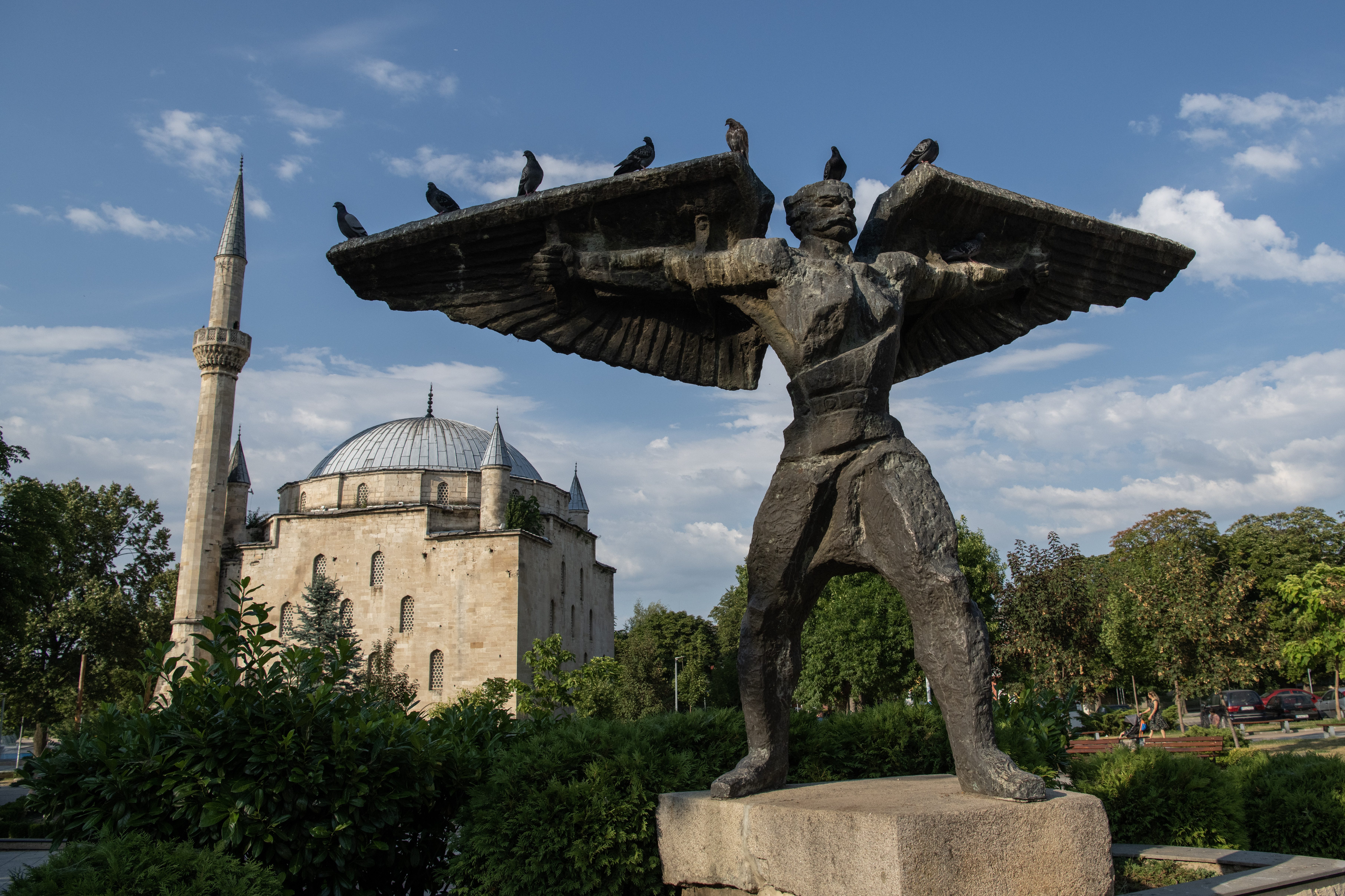 Снимката документира паметника на майстор Манол в град Разград.